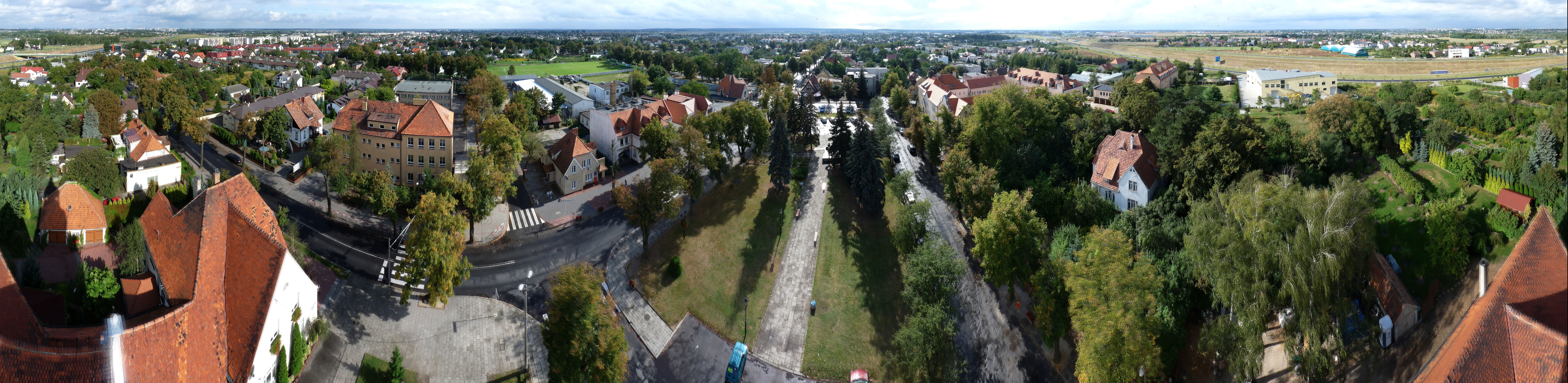 Panorama Lubonia (koło Poznania) składająca się z 24 składowych zdjęć połączonych ze sobą; została wykonana z najwyższego miejsca obserwacyjnego w Luboniu: kościoła św. Barbary, w dniu 13 września 2009 roku